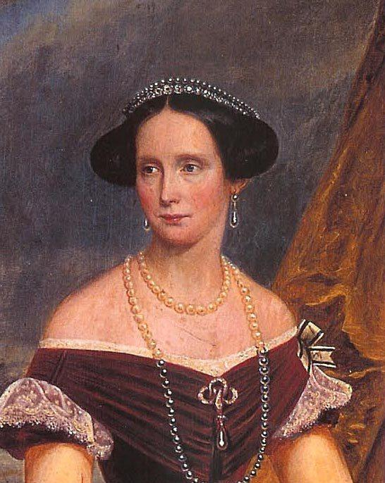 portret van een jonge prinses Louise van Pruisen (overleden 1871).